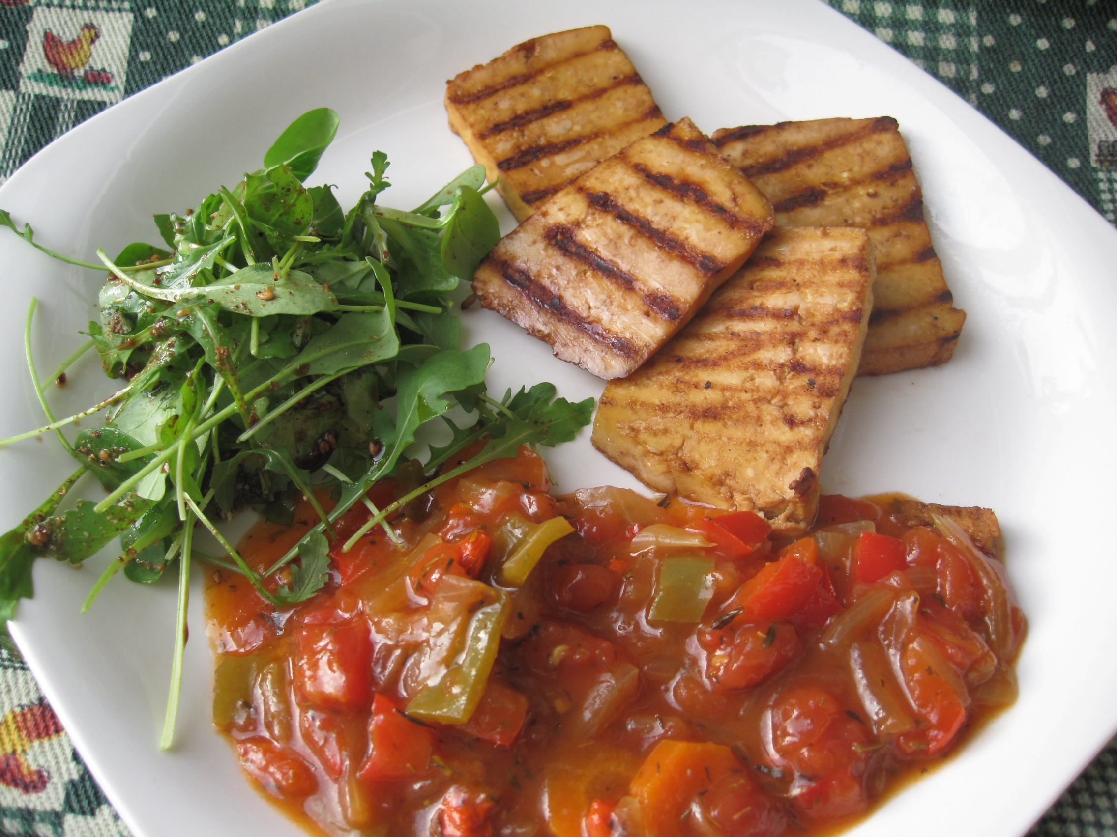 Тофу натопљен у сојином сосу и испечен, са салатом од матиловца и руколе и писто од поврћа.